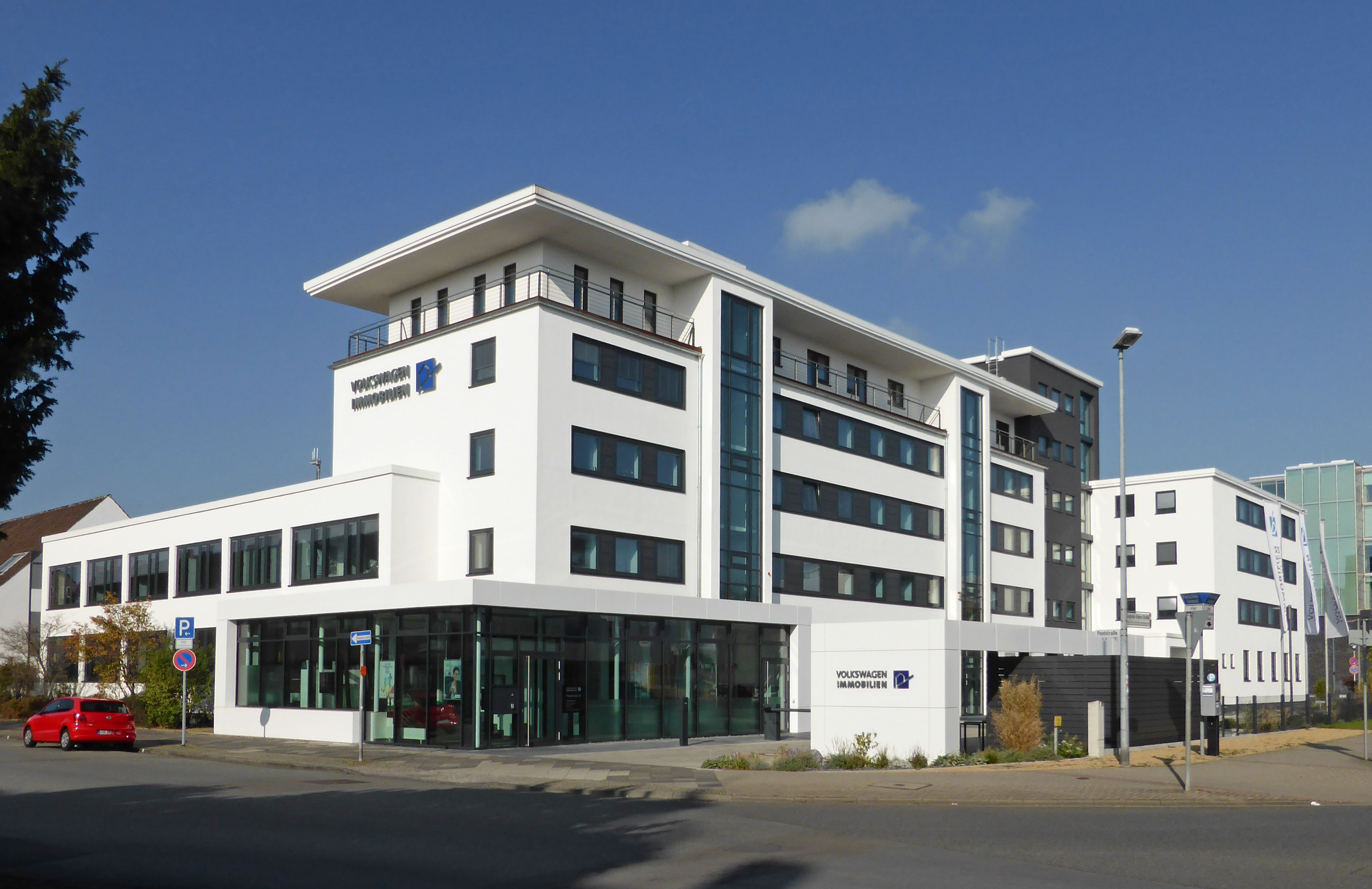 Sitz von Volkswagen Immobilien an der Poststraße in Wolfsburg.